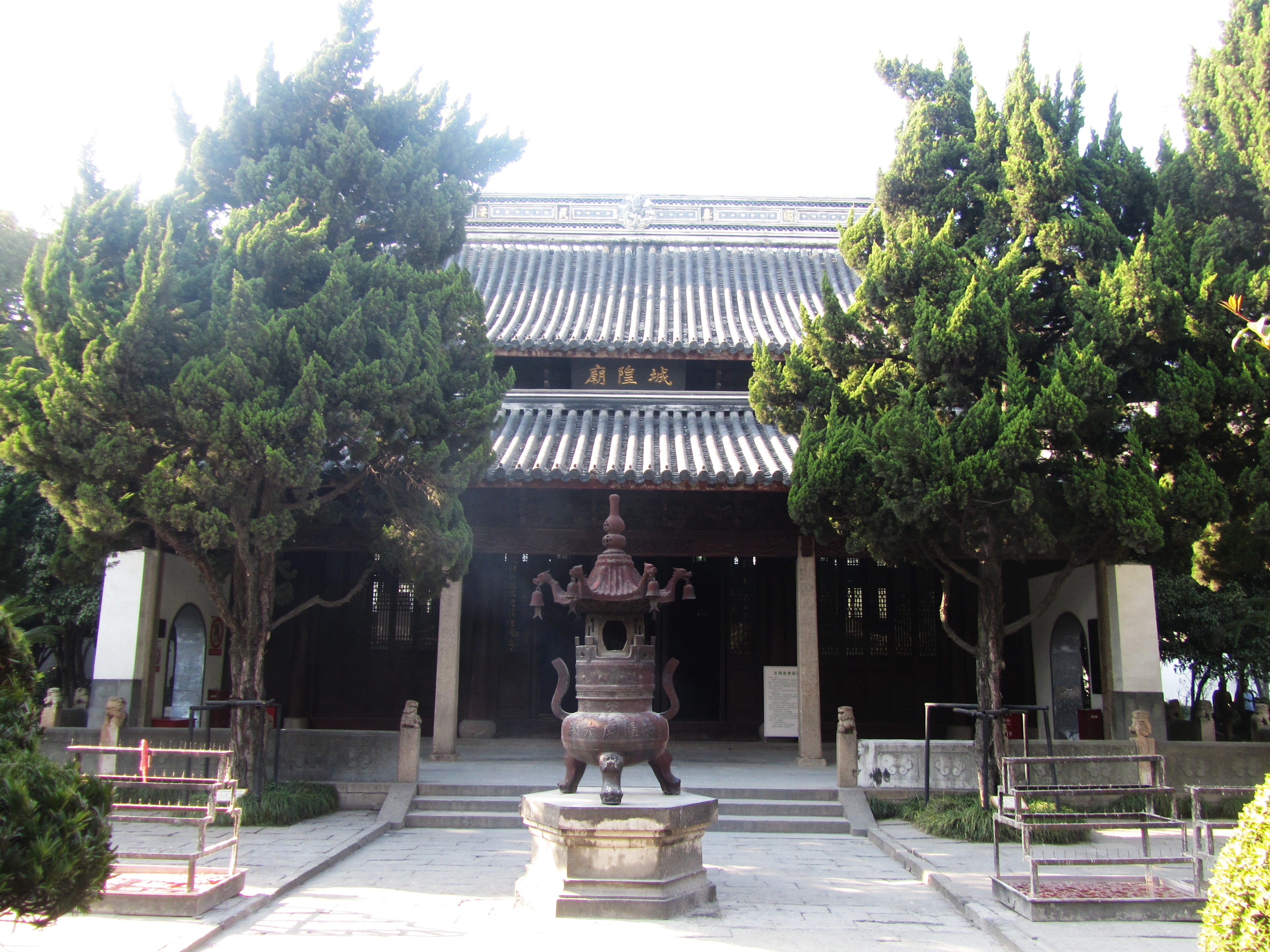 嘉定城隍庙，大殿前抱厦。